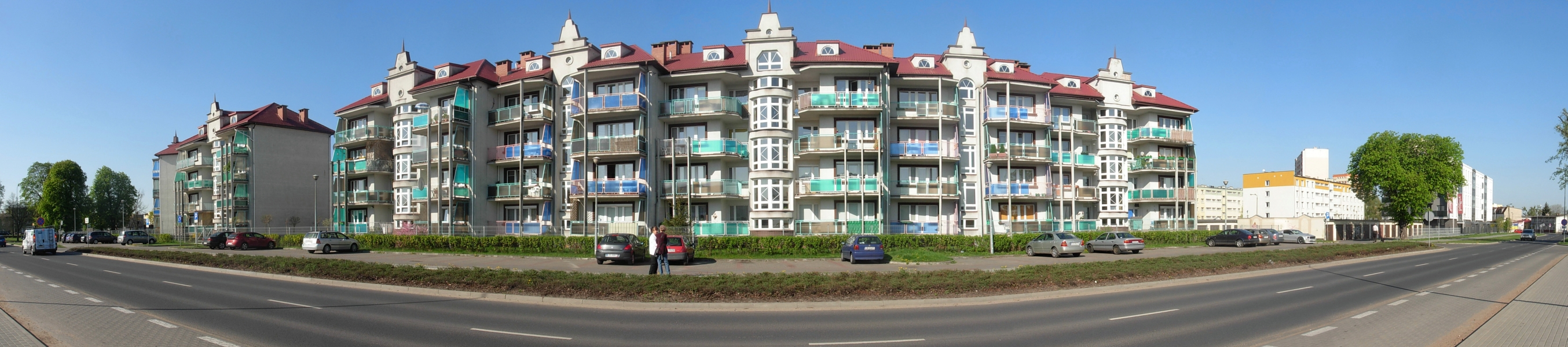 Zabudowa przy ul. Koszarowej na osiedlu Błonie w Bydgoszczy